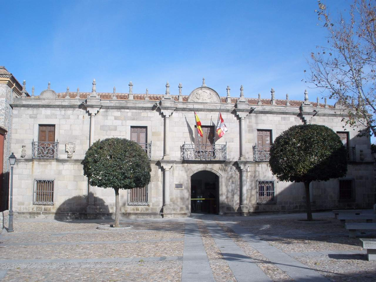 Casa de los Deanes (Museo de Ávila), en Ávila